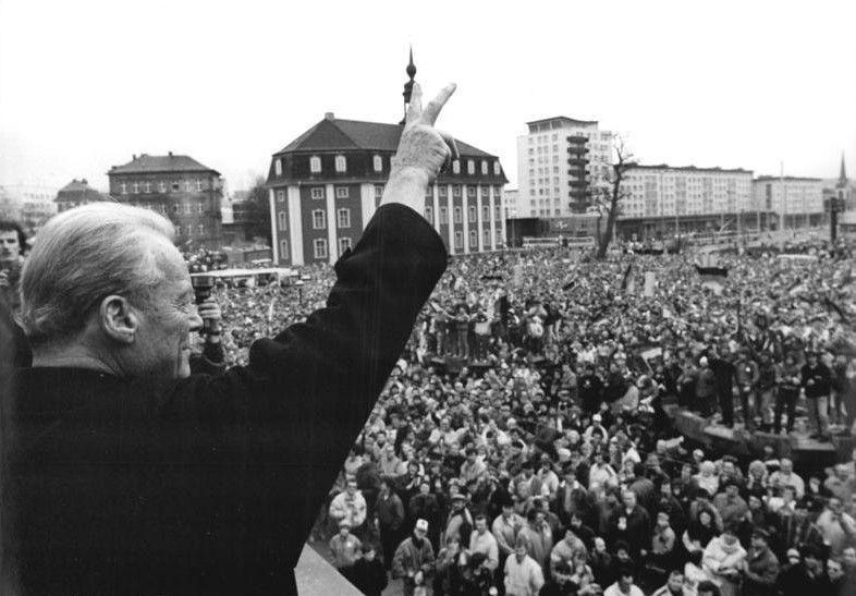 ADN-ZB-Kasper-4.3.1990-Bez. Gera: Wahlkampf. Wie alle Politiker zeigt sich auch der Ehrenvorsitzende der SPD beider deutschen Staaten, Willy Brandt, während großer Wahlkampfkundgebungen - hier am Nachmittag auf dem Geraer Platz der Republik stets optimistisch. Und in Thüringen hat er schon allen Grund, das Land gilt traditionell als sozialdemokratische Hochburg